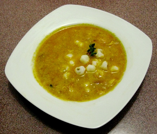 Plato de mote pata cuencano, elaborado con carne de chancho y mote.